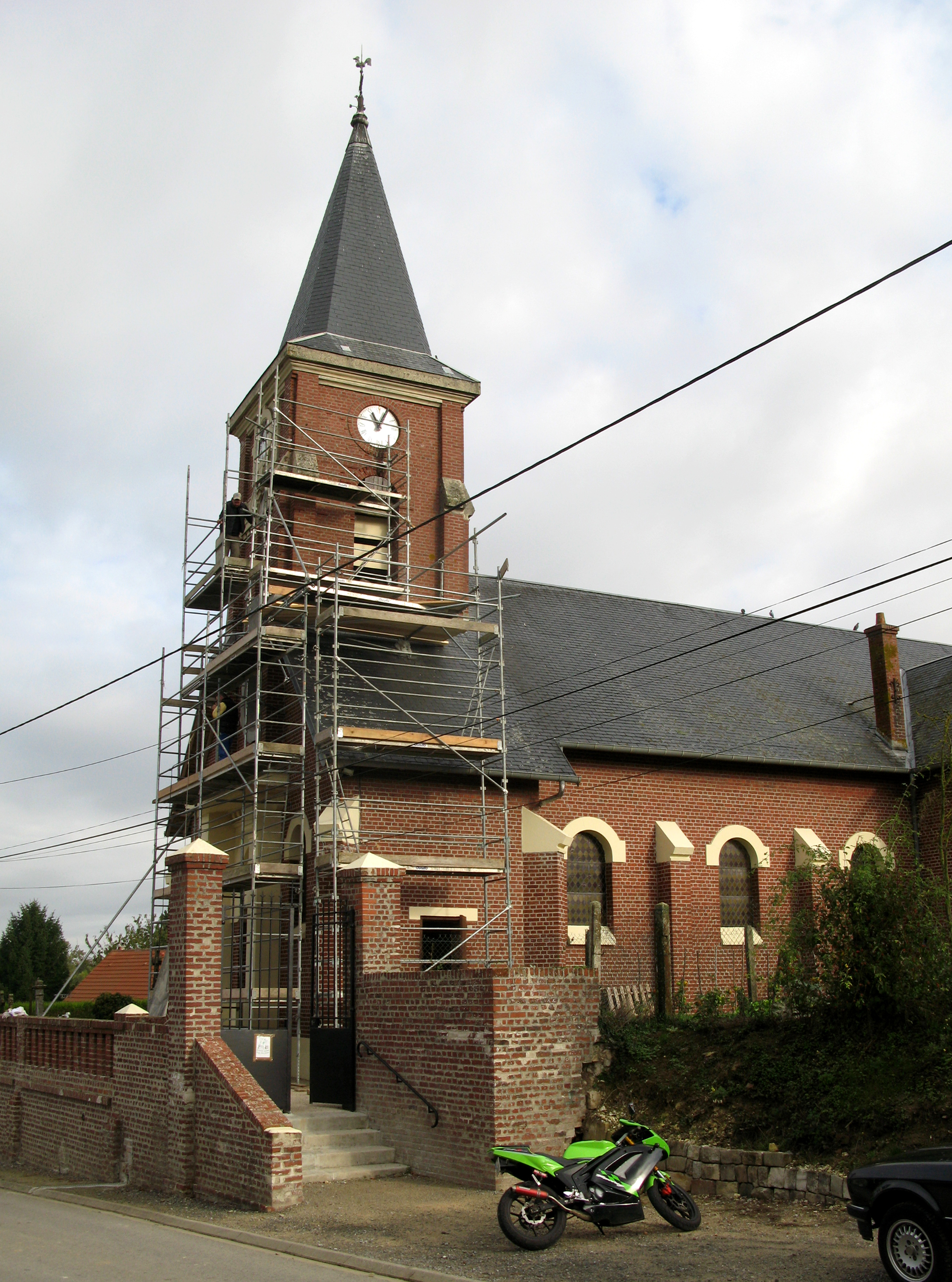 Maissemy (Aisne, France) - L'église est en travaux à l'automne 2009. . .